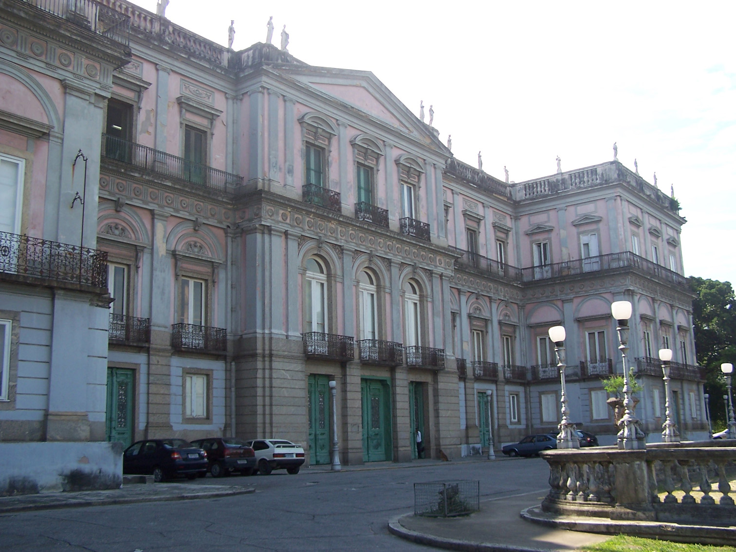 Façade of Quinta da Boa Vista Palace (National Museum), Rio de Janeiro, Brazil